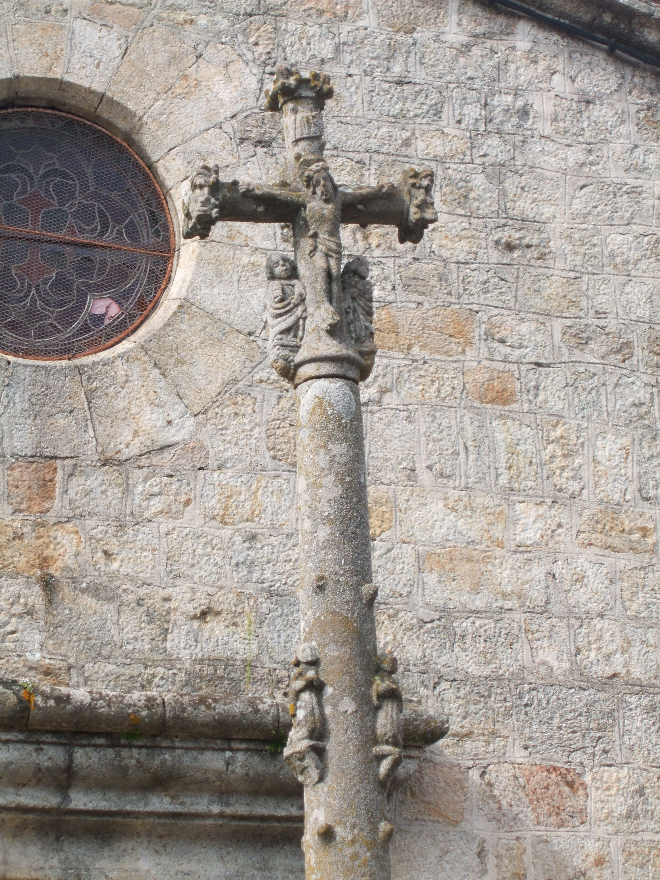 Croix du Crestet peut-être édifiée après l'épidémie de peste de 1585-87 par les habitants de le Crestet et Monteil pour témoigner leur reconnaissance d'avoir été épargnés par le fléau croix du XVIe siècle à le Crestet. (Inscrit, 1927) .